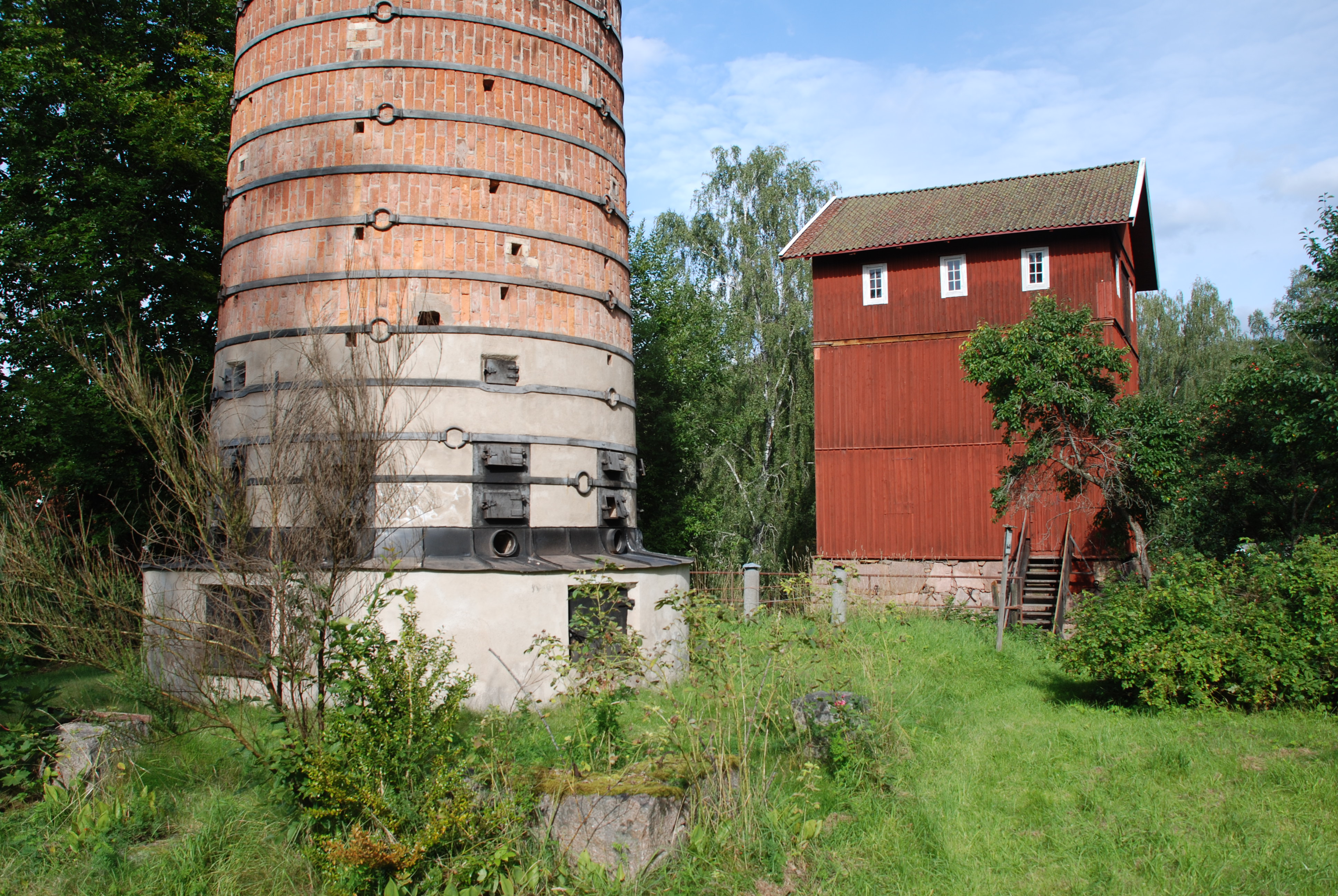 Rostugn och masugn i Åryd